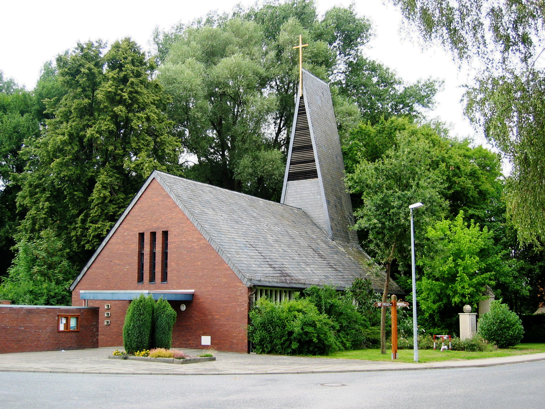 Kreuzkapelle in Alvesse (Edemissen) im Jahr 2010. Erbaut 1962.